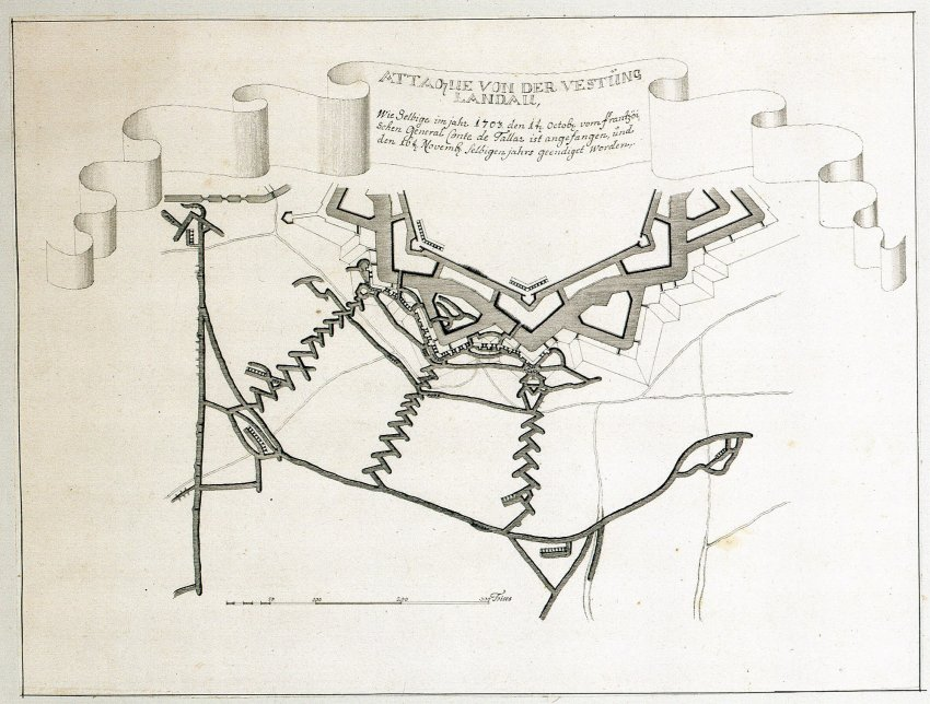 Originaltitel: Attaque von der Vestung Landau wie selbige im Jahre 1703 den 14t. Octobr. vom frantzöischen General Comte de Tallas ist angefangen und den 16t. Novembr. selbigen Jahres geendiget worden [ist gleich] Grundriss der Belagerungsanlagen gegen Landau durch die französischen Truppen unter General Comte de Tallas, 14. Oktober bis 16. November 1703 Ausführung: Handzeichnung Inhaltliche Beschreibung :Grundriss der Festung und der Belagerungsanlagen von Landau 1703 Ersteller: unbekannt